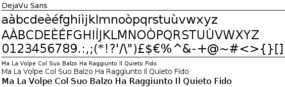 Campione del tipo di carattere DejaVu Sans. La famiglia di caratteri DejaVu è liberamente utilizzabile e modificabile. Categoria:Immagini esclusivamente in GNU FDL